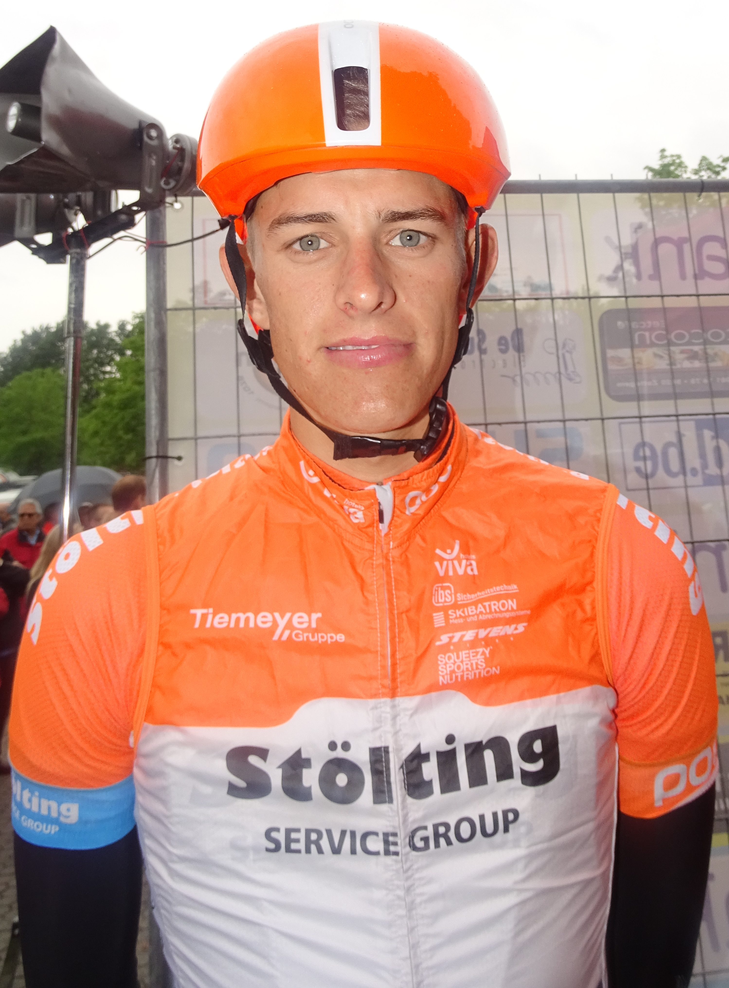 Reportage réalisé le mardi 18 août à l'occasion du départ et de l'arrivée du Grand Prix de la ville de Zottegem 2015 à Zottegem, Belgique.